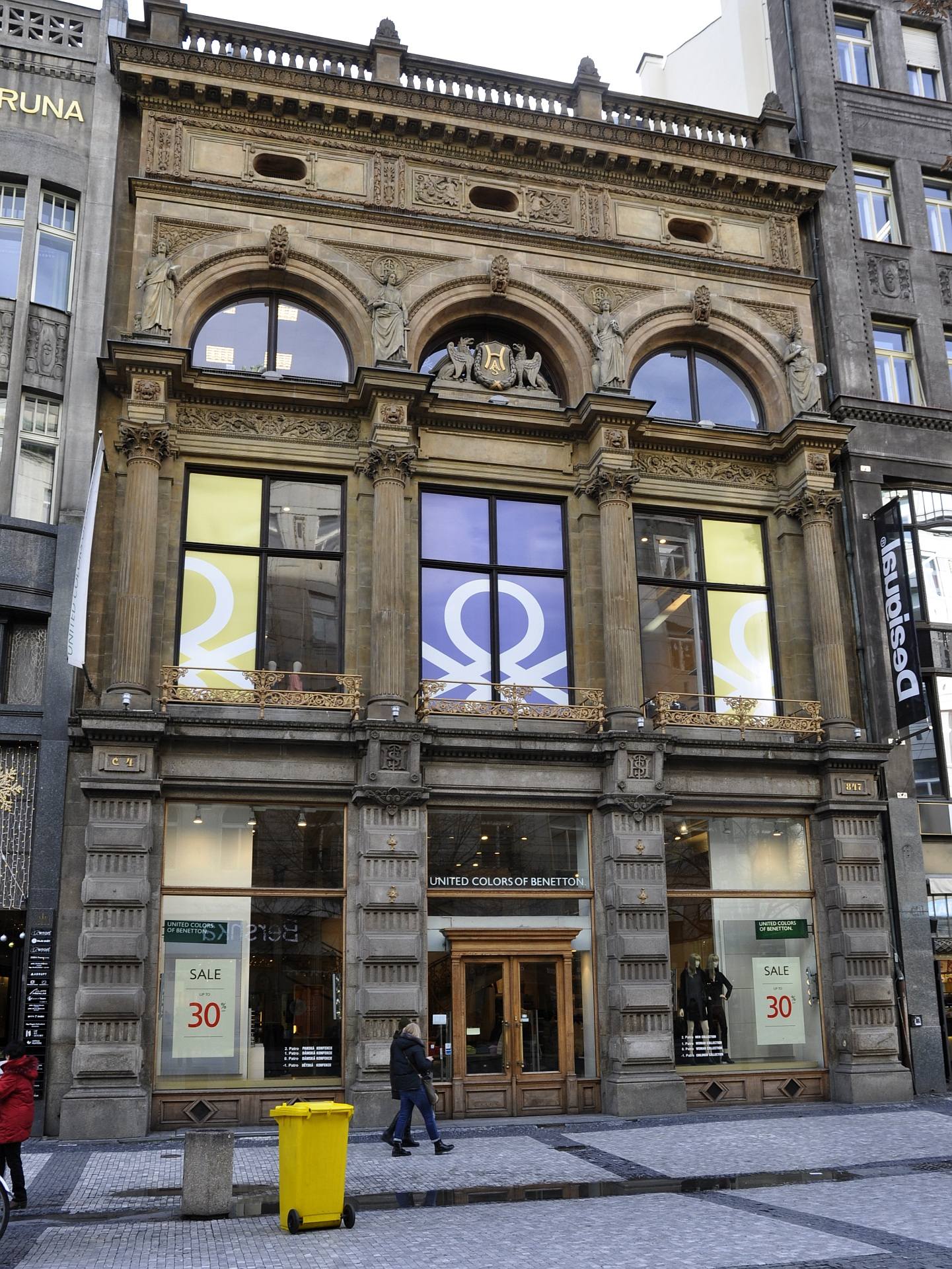 Obchodní dům, Praha 1, Na příkopě 847/4, Nové Město (Praha).